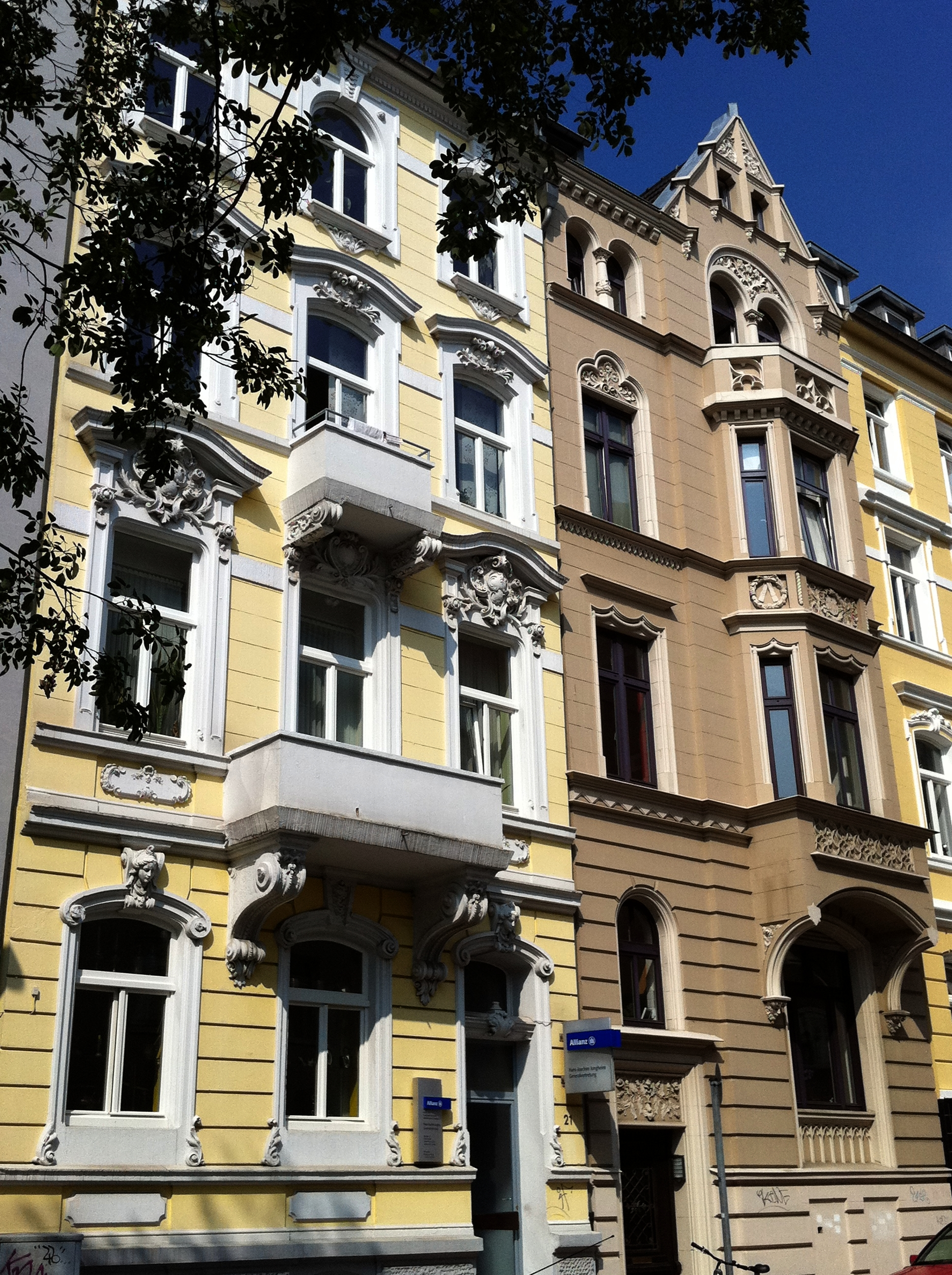 Baugruppe Rochusstraße 21-23, Architekt Arnold Königs (1900); Haus Nr. 23 ist das Geburtshaus von Hans Königs